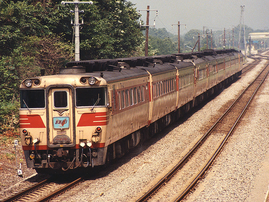 国鉄 キハ82系特急「おおとり」